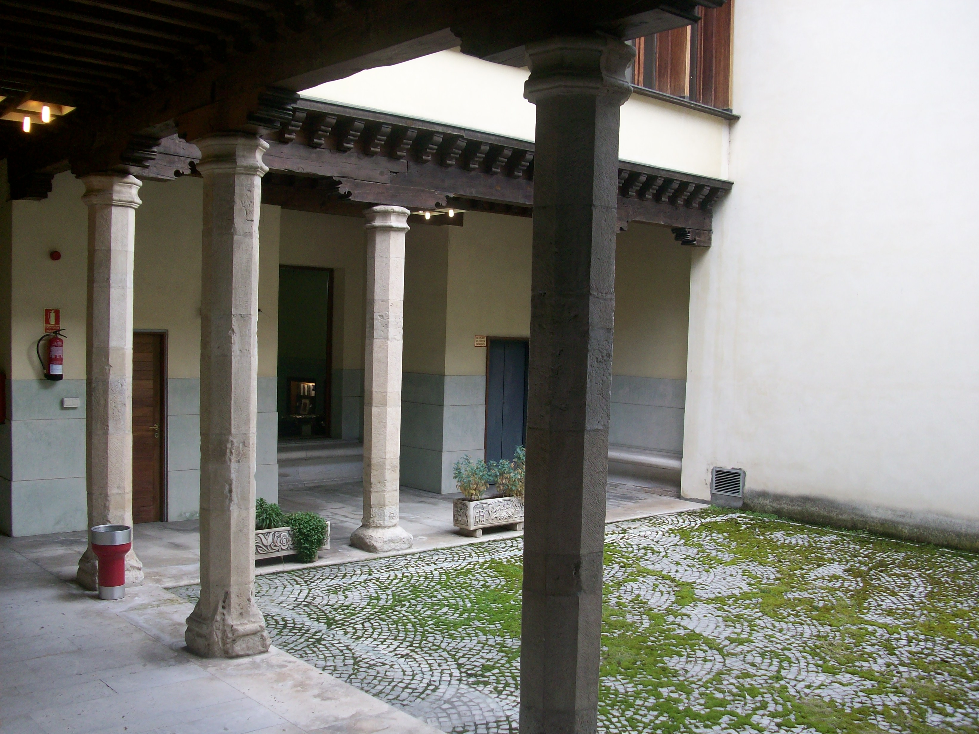 Palacio de los condes de Buendía ubicado en la Calle Juan Mambrilla nº 14 de Valladolid, sede del Centro Buendía de la Universidad de Valladolid.